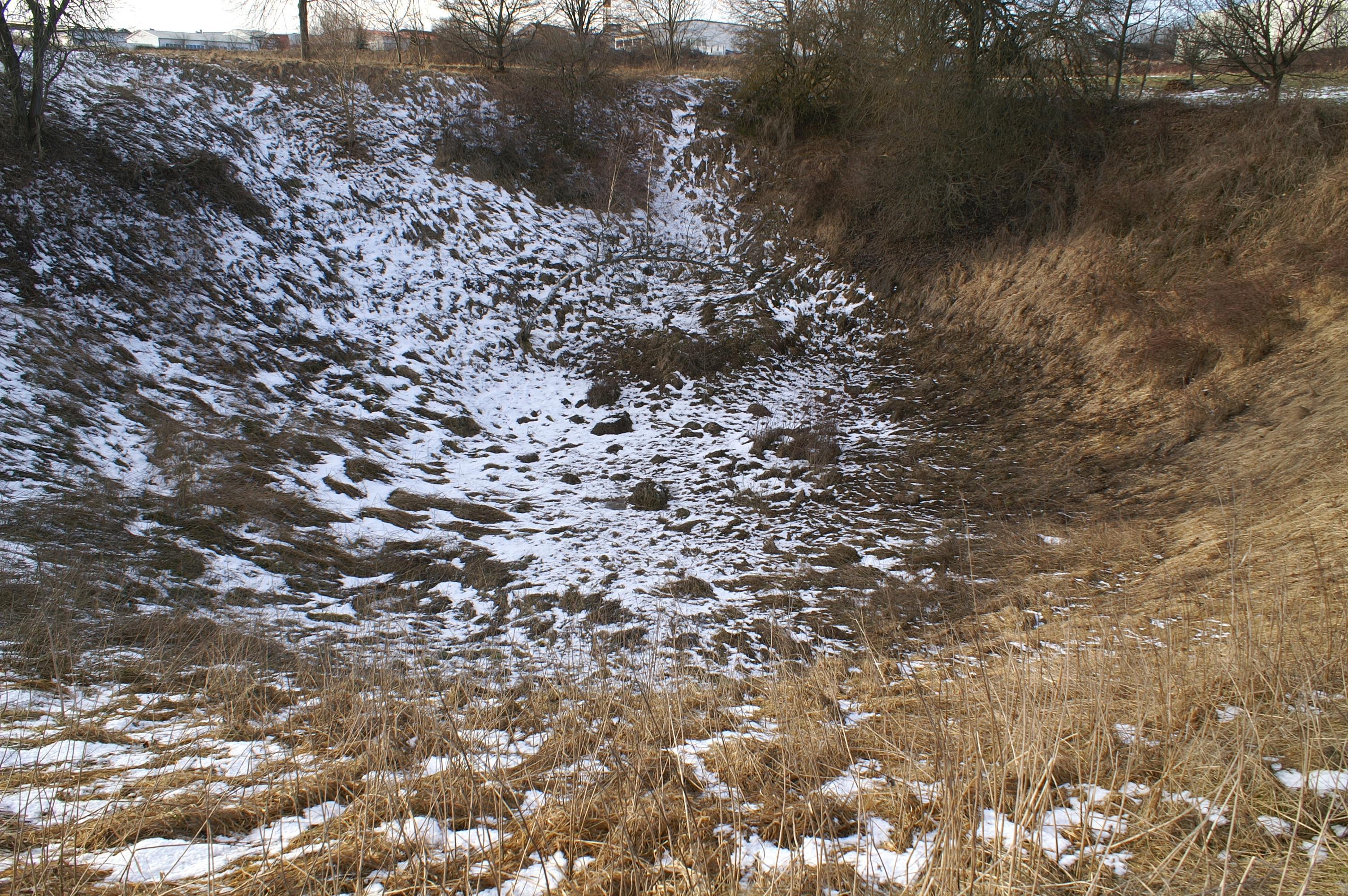 Die Doline "Vogts Grub" in Laichingen zählt mit 55 Metern Durchmesser und 10 Metern Tiefe zu den größten Dolinen der Schwäbischen Alb